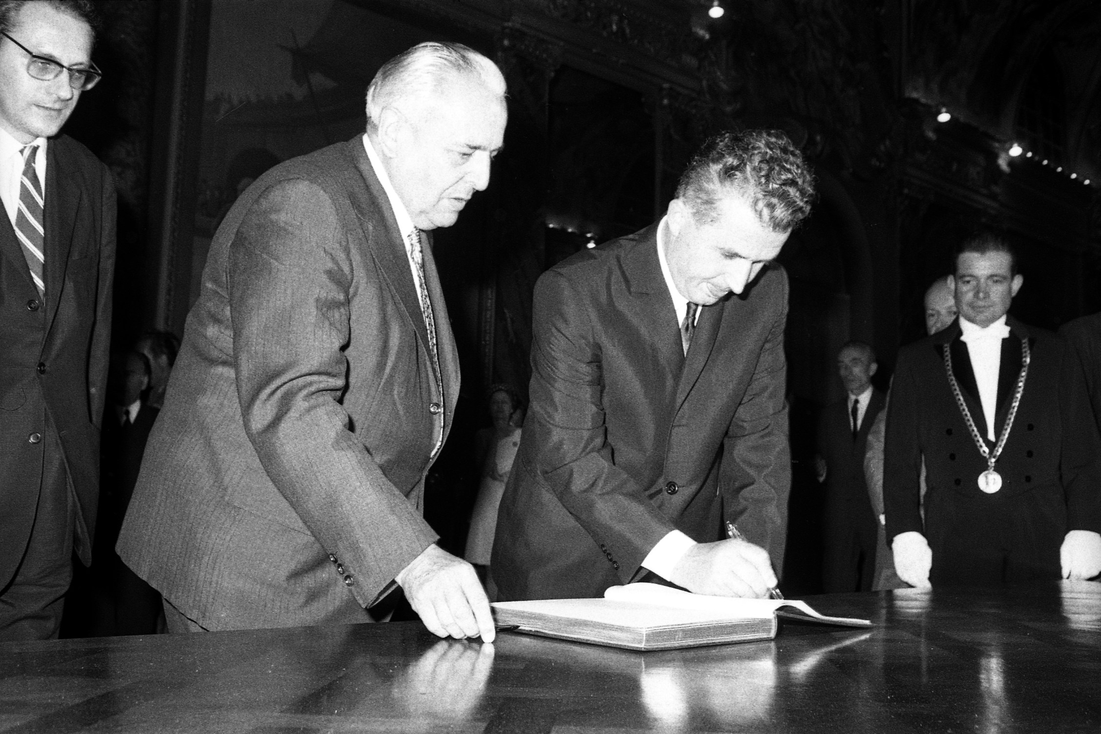 Mairie de Toulouse. Le 17 Juin 1970. Vue de Monsieur Ceausescu, président de la Roumanie, signant le livre d'or auprès du maire de Toulouse au Capitole.